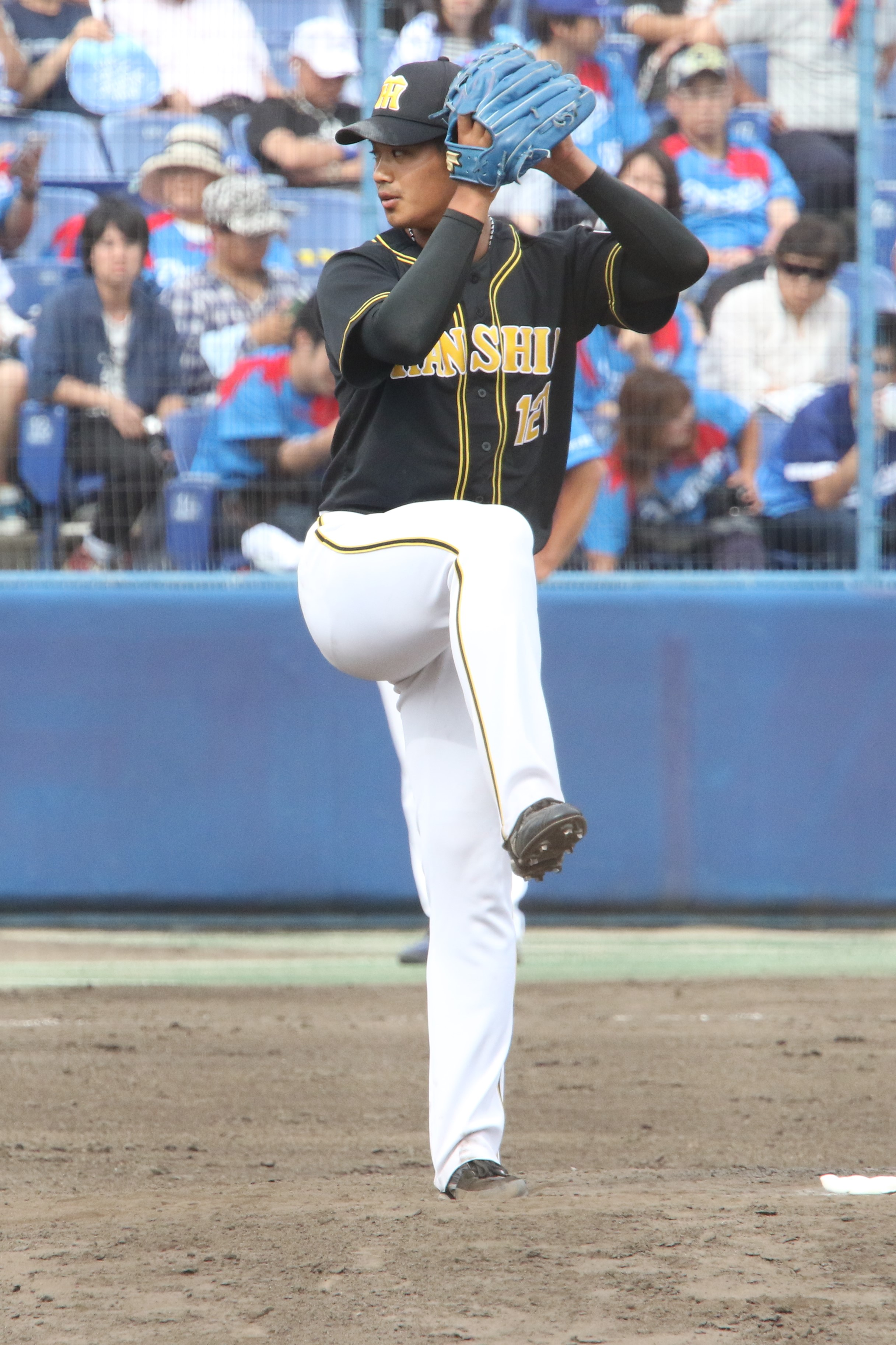 阪神タイガース時代 （2018年5月26日、ナゴヤ球場にて）